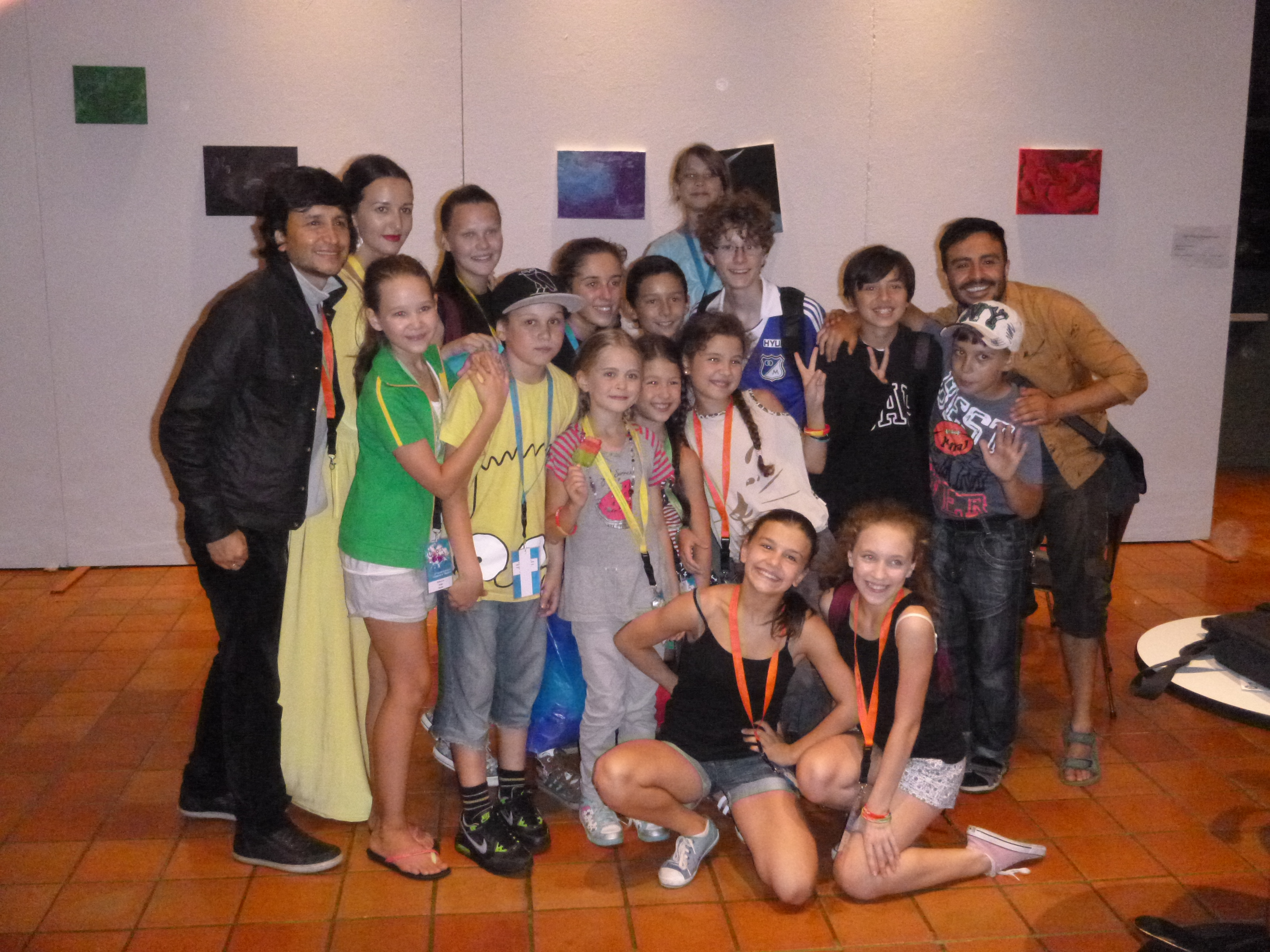 Monda Infanteatra Festo en Lingen 2014 - aktoroj el manpleno da diverslandaj teamoj